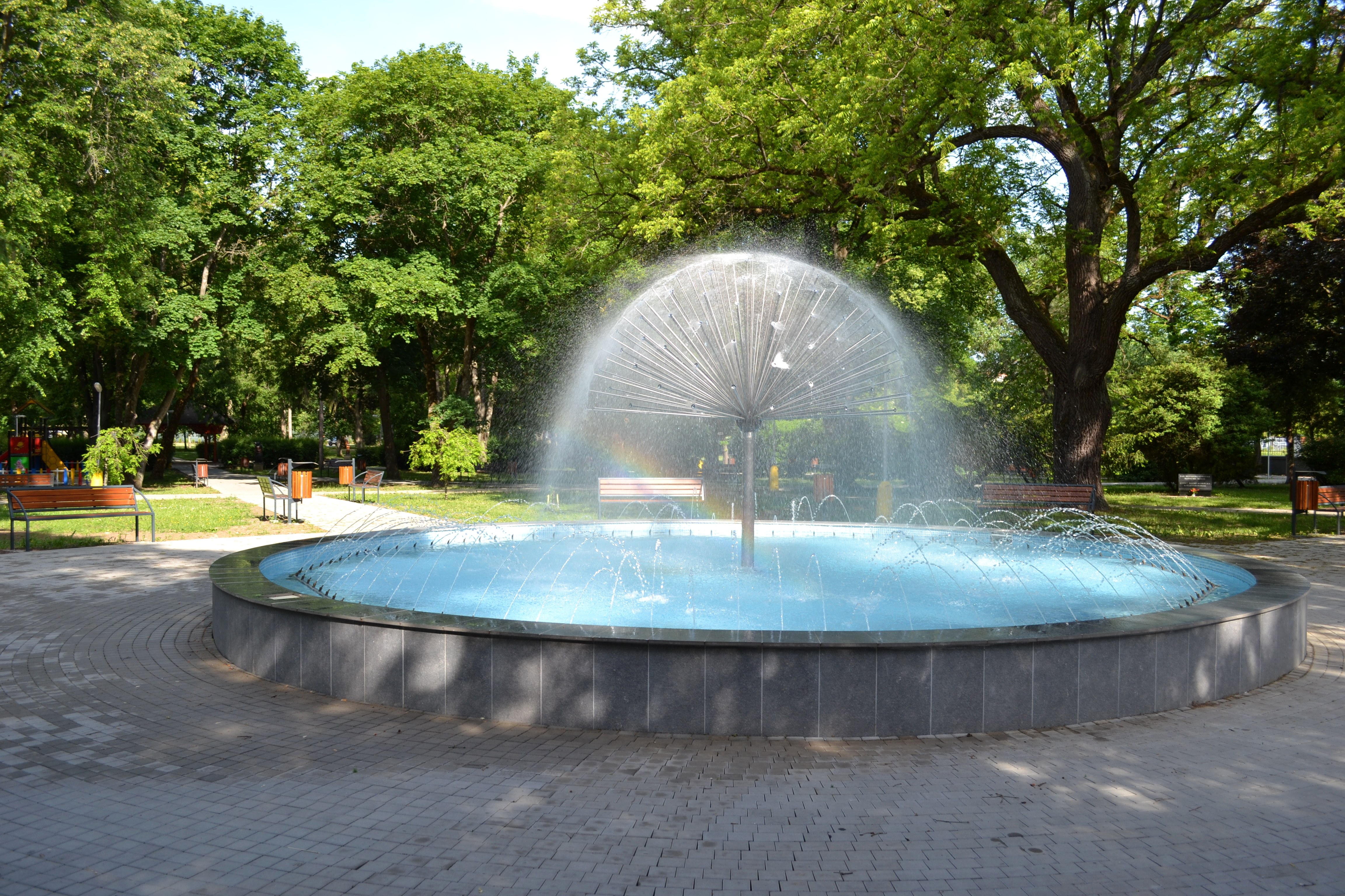 Fontána v Mestskom parku